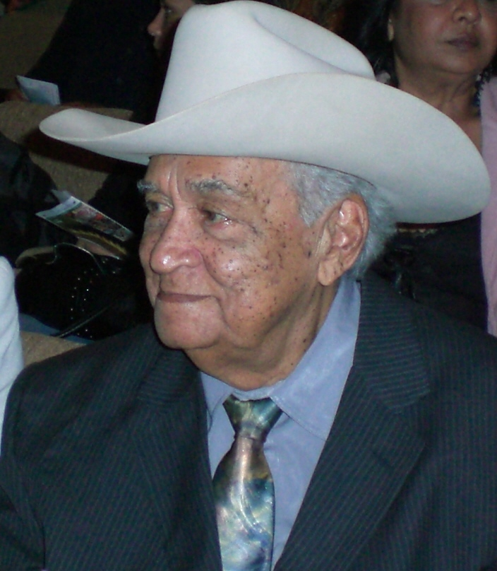 Venezuelan musician Juan Vicente Torrealba